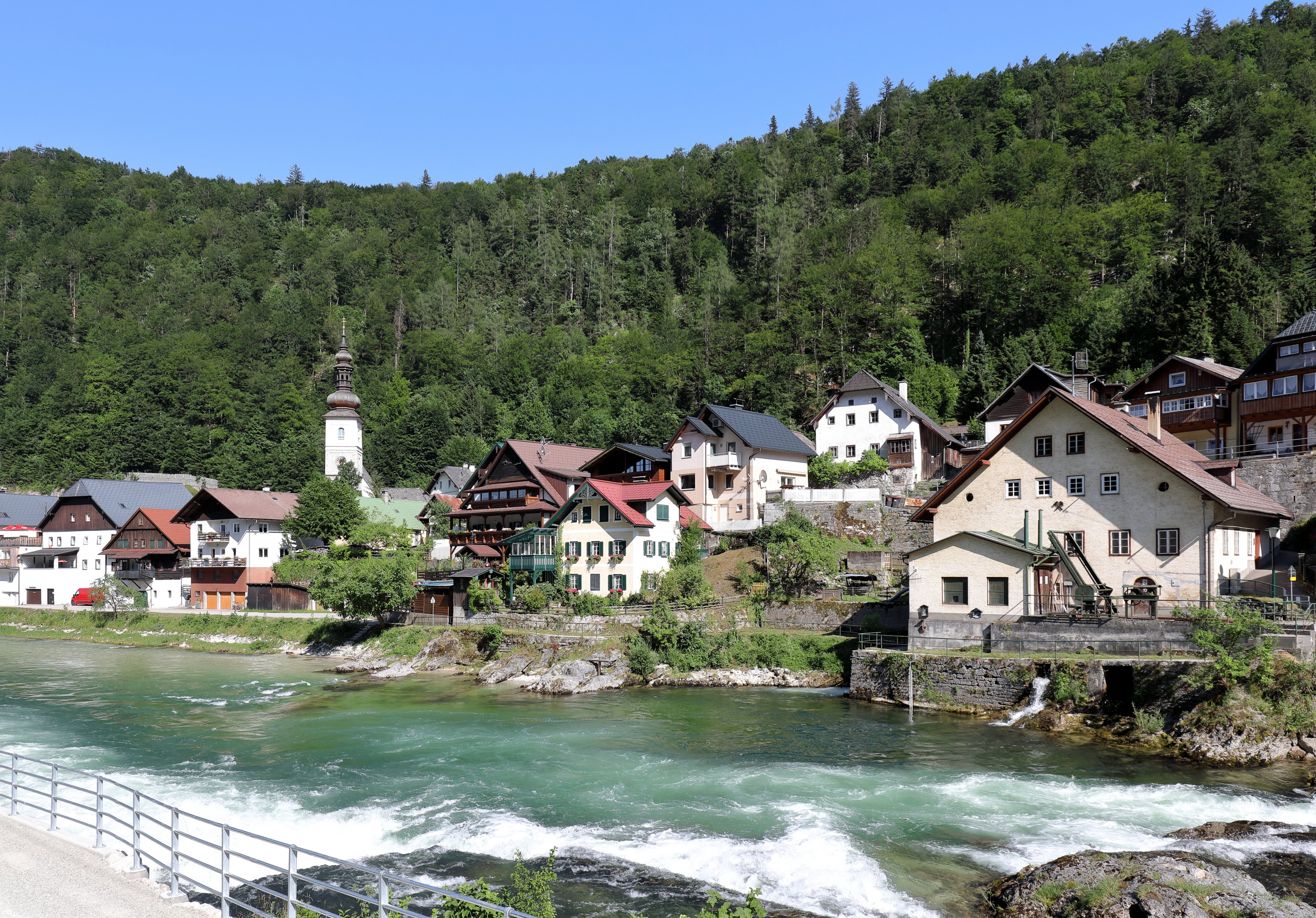 Westansicht des Ortszentrums von Lauffen, ein Ortsteil der oberösterreichischen Stadtgemeinde Bad Ischl.